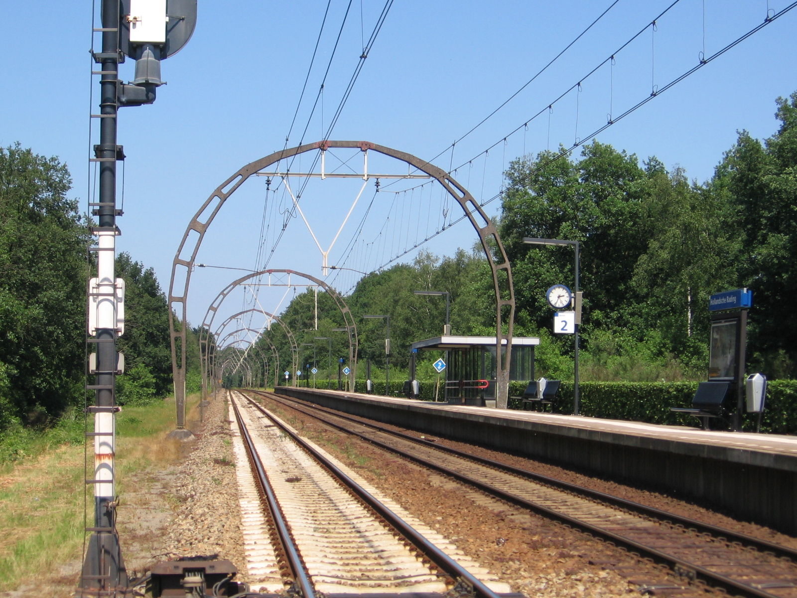 Hollandsche Rading, juni 2006